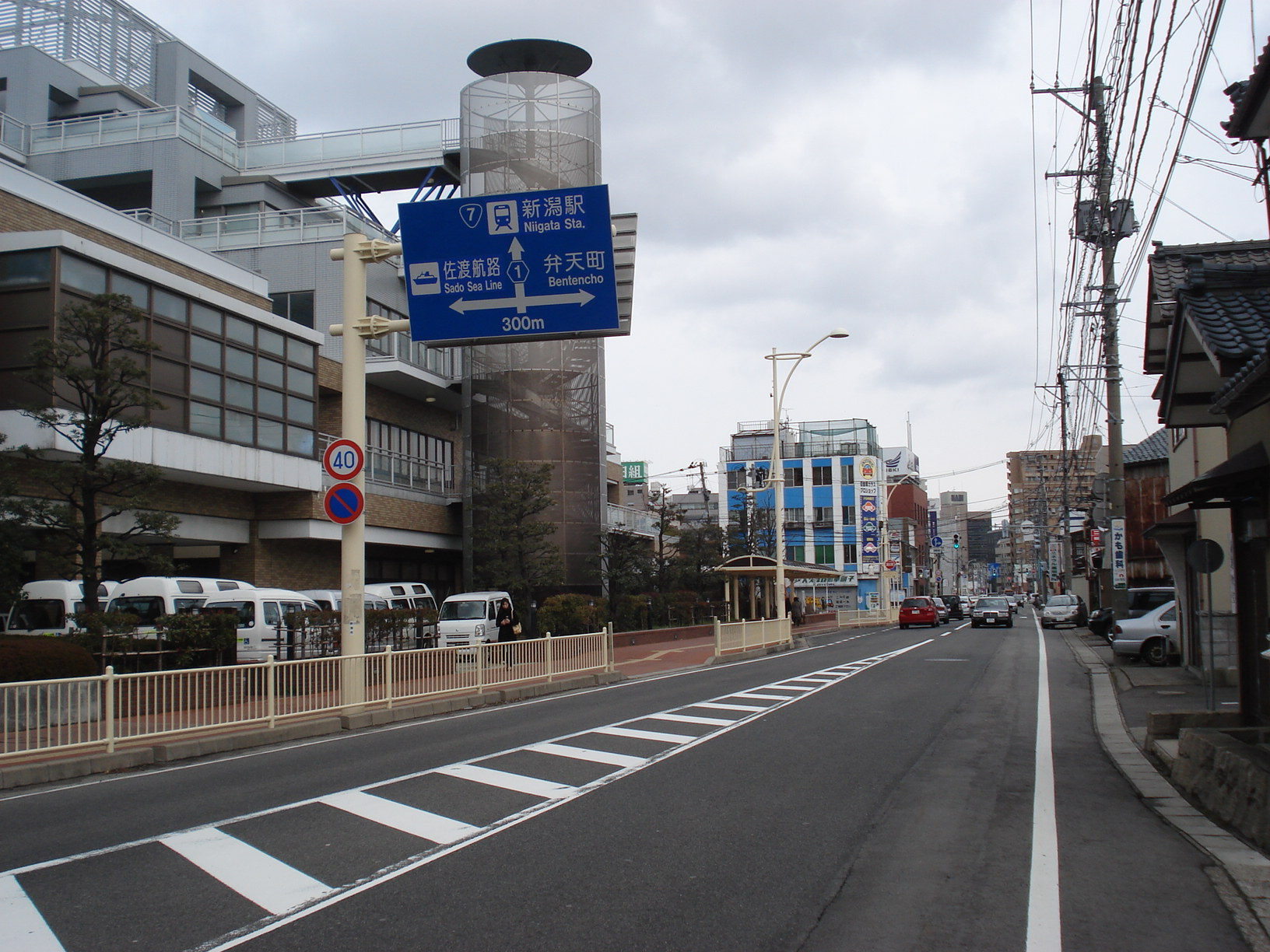 新潟県道1号 新潟小須戸三条線 新潟県新潟市中央区八千代1丁目付近